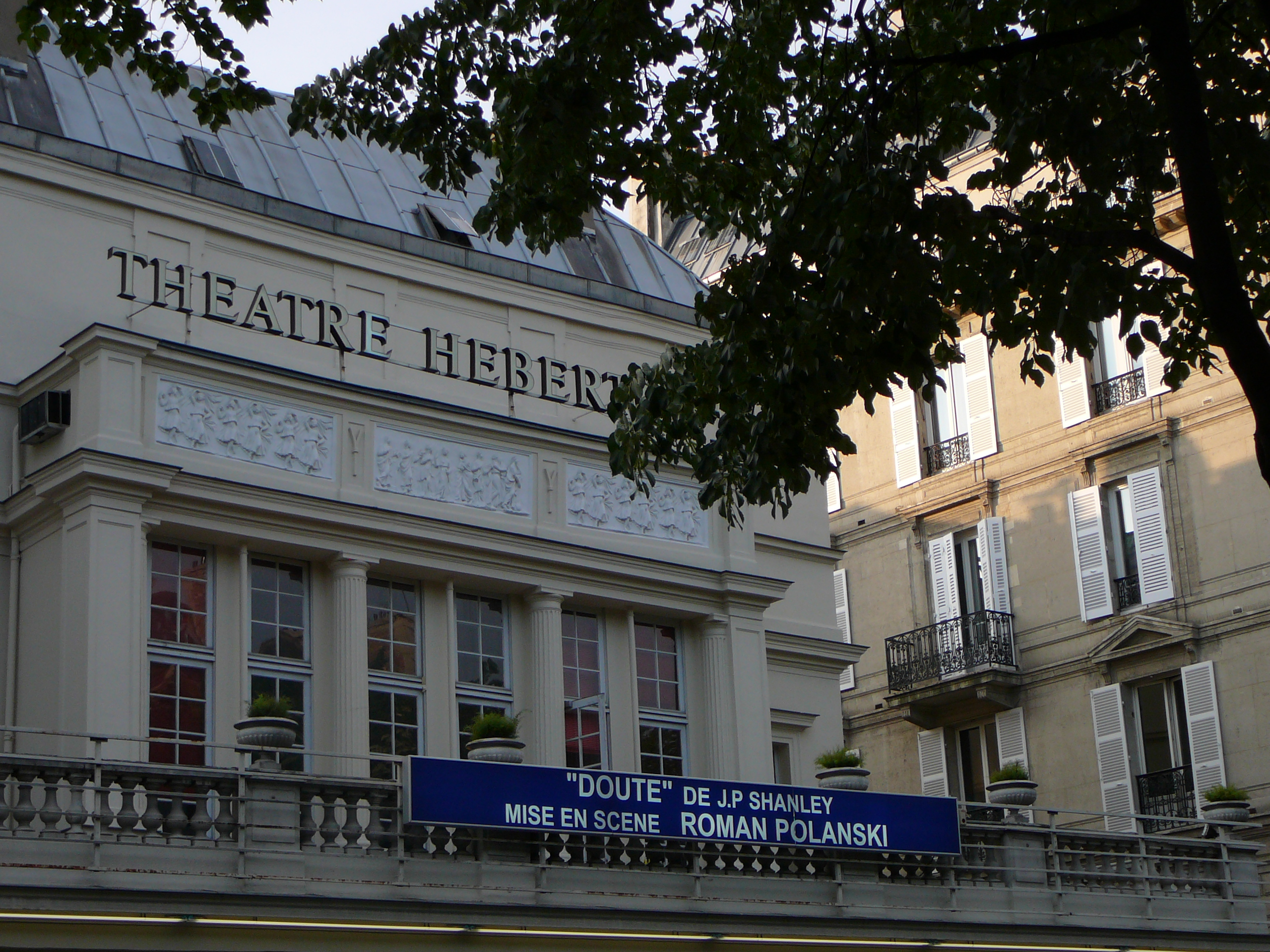 Le théâtre Hébertôt, été 2006 (dernières dates de la pièce "Doute").